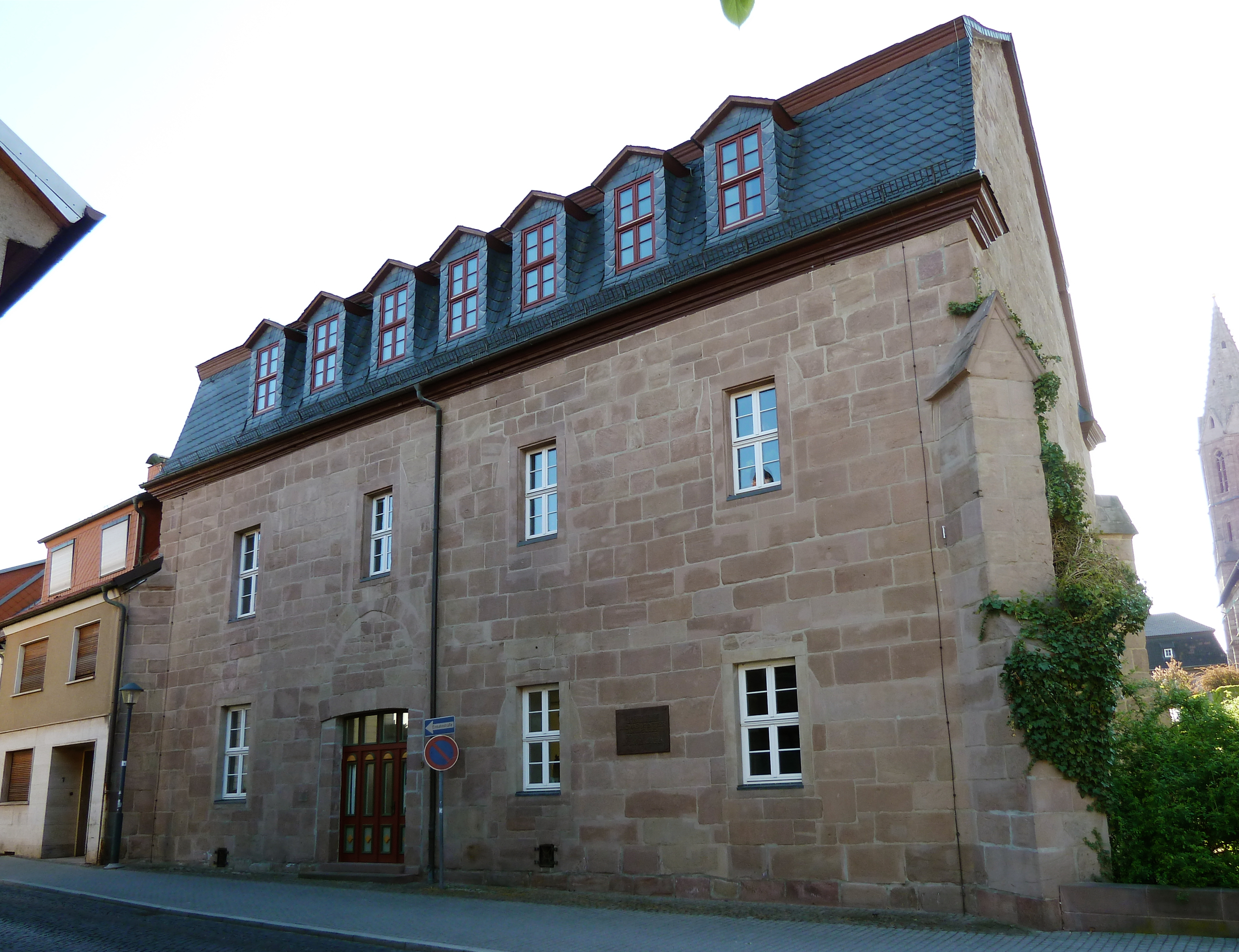 Altes Rathaus der Stadt Heiligenstadt, Eichsfeld, Thüringen. Erbaut vermutlich vor 1300 als Rathaus, 1739 Ruine durch Brand, 1789 Armenhaus. Saniert 1999-2000 (Quelle: Informationstafel am Gebäude)